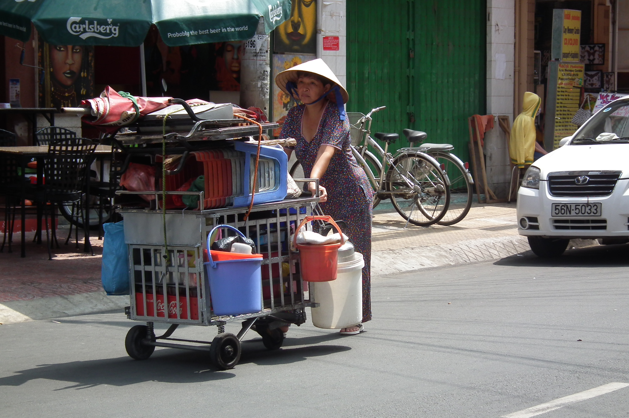 Bui Vien St.ブイヴィエン通り Thành phố Hồ Chí Minh 城舗胡志明 ホーチミン